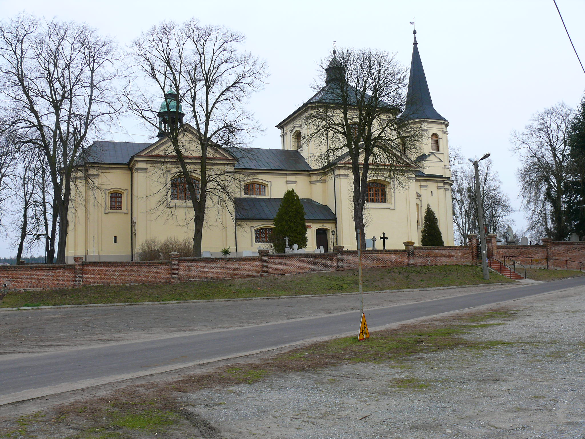 Obrzycko, kościół pw. śś. apostołow Piotra i Pawła (zabytek nr rejestr. 2449/A)